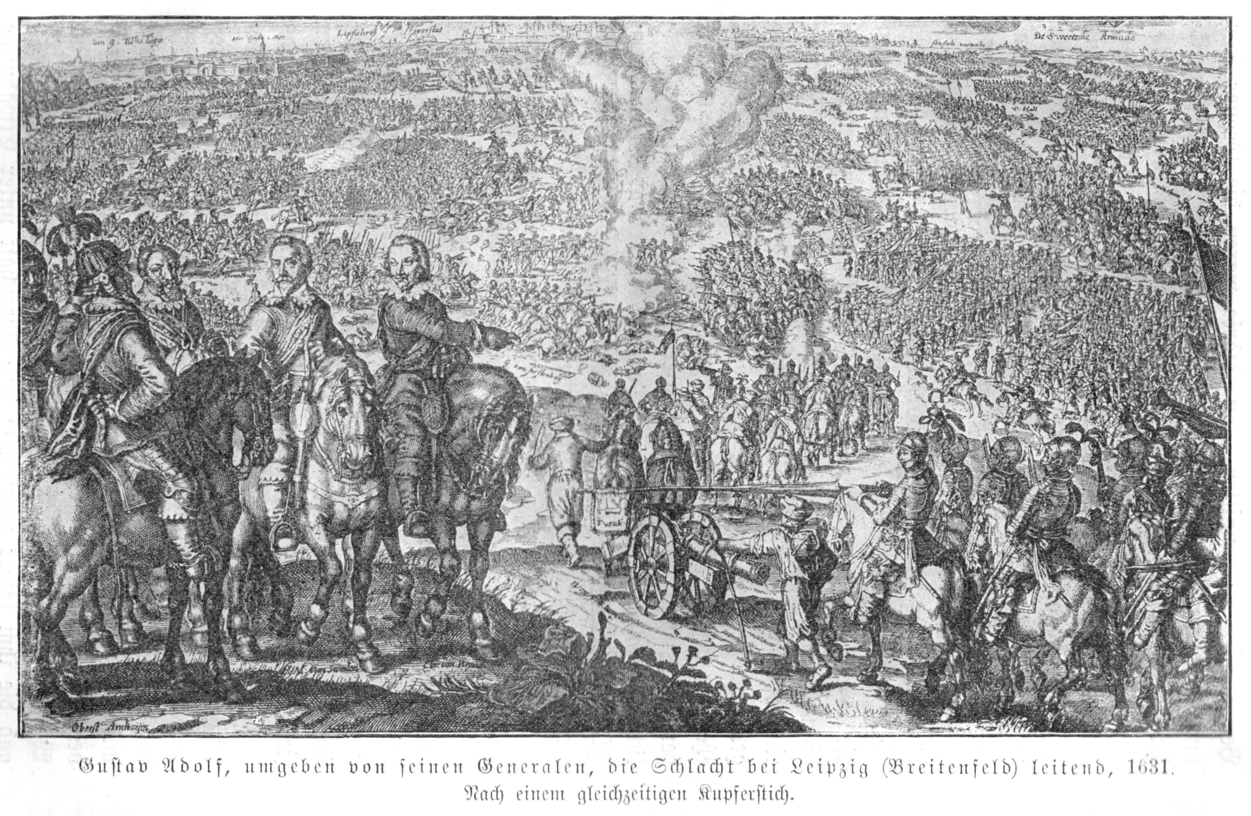 Gustav Adolf, umgeben von seinen Generalen, die Schlacht bei Leipzig (Breitenfeld) leitend, 1631. Nach einem gleichzeitigen Kupferstich.